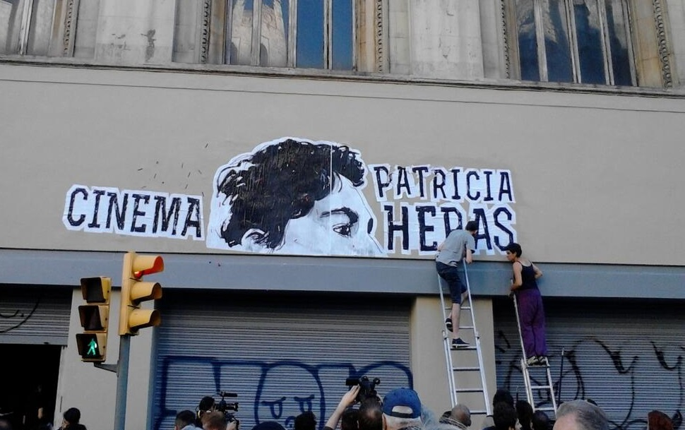 El Palau del Cinema (Via Laietana 53), erigit el 1923, tancat el 2001 i rebatejat com a Cinema Patricia Heras arran de l'ocupació del 8 de juny de 2013.